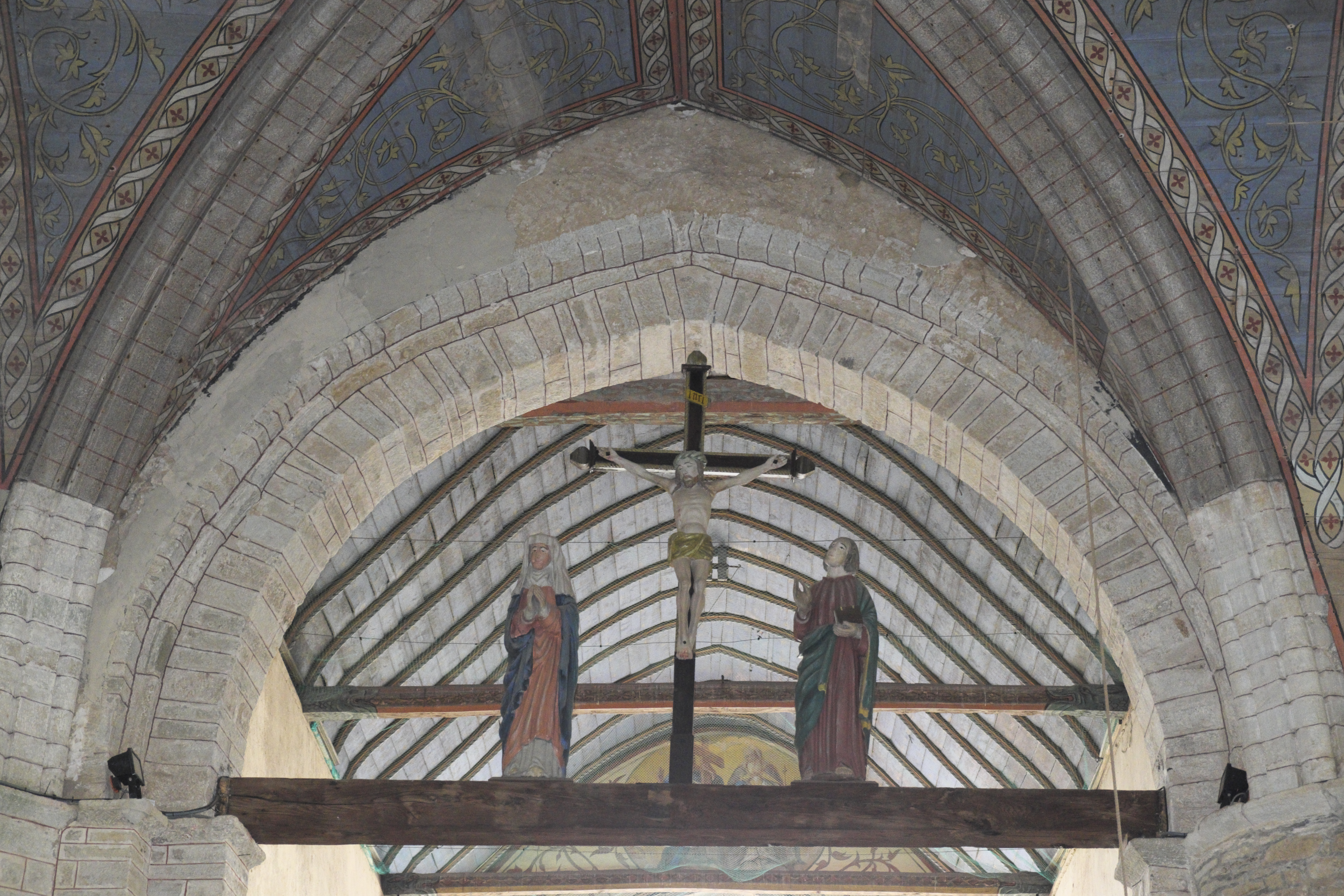 Kapelle Notre-Dame-de-Kernitron in Lanmeur im Département Finistère (Region Bretagne/Frankreich), Kreuzigungsgruppe